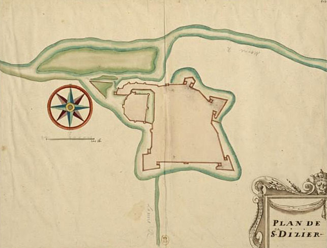 Plan de St Dizier : dessin